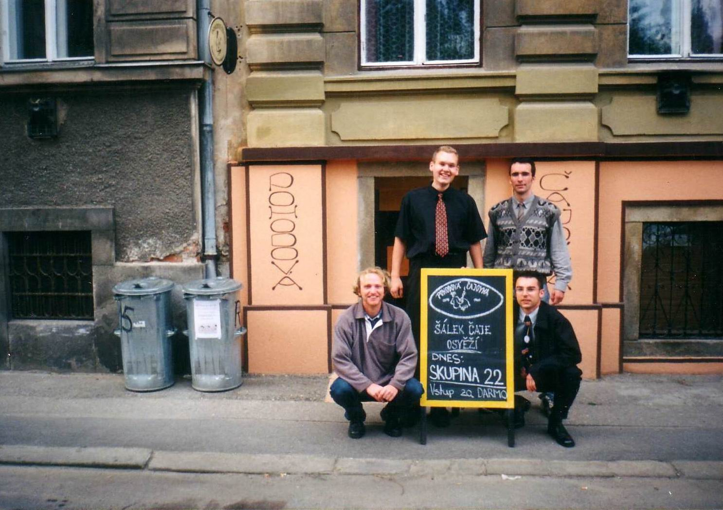 Skupina 22 před autorským čtením roce 2001 v Pohodové čajovně v Českých Budějovicích, Riegrova 1801/15.